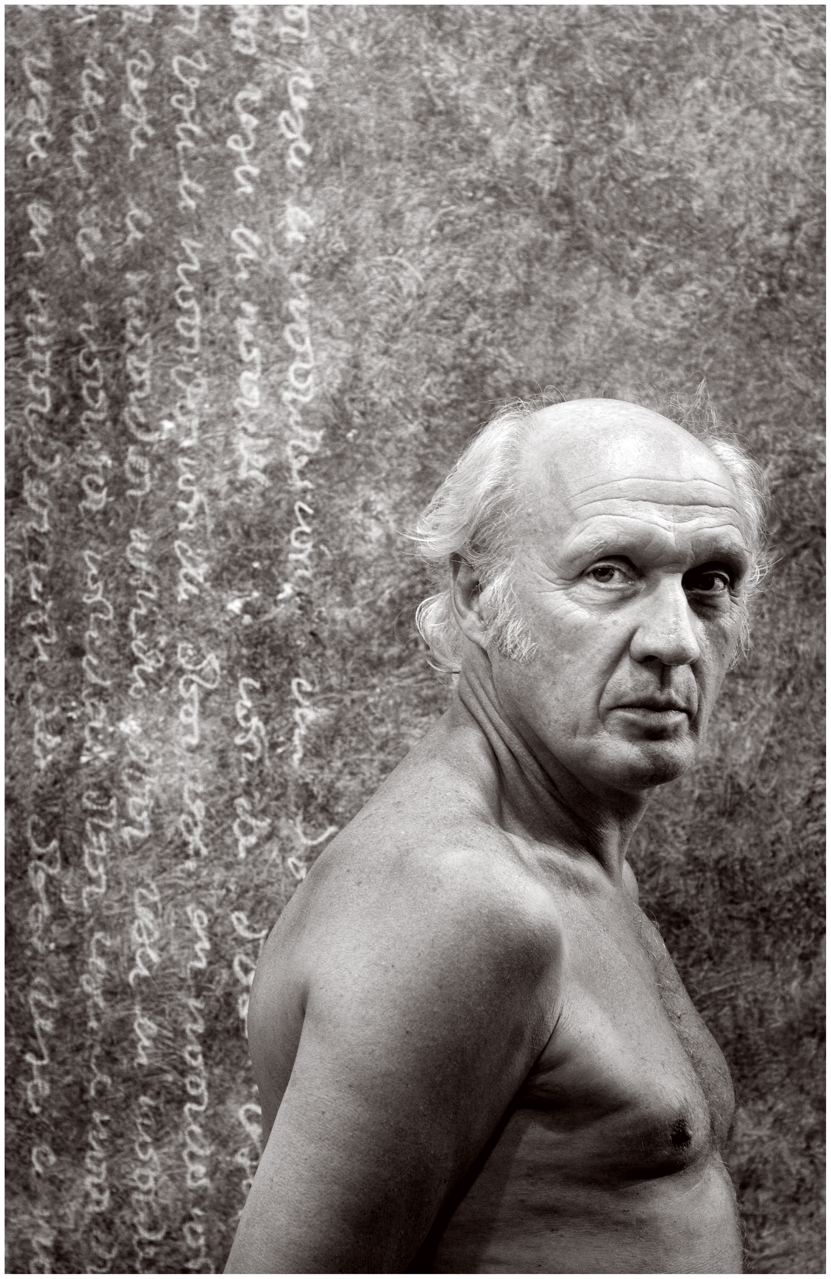 Herman van Veen, Nederlandse clown, cabaretier, schrijver, regisseur, musicus, acteur en presentator. Van vak is hij violist en zanger